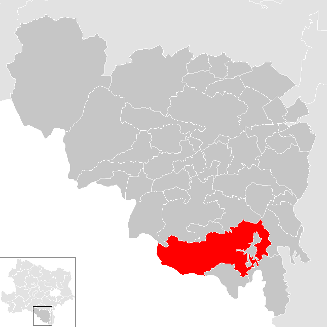 Bezirk Neunkirchen